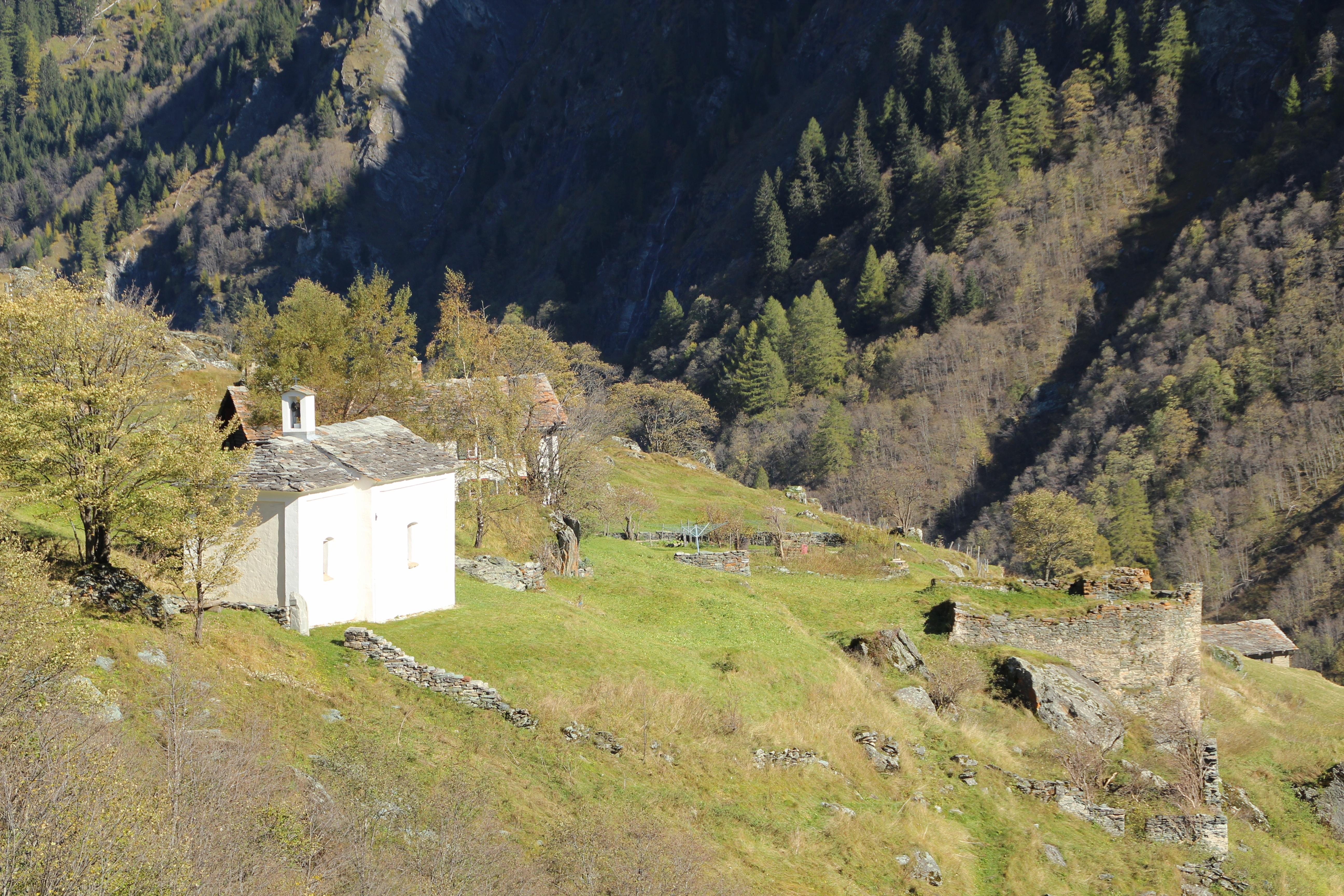 links die neue Kapelle, rechts die Ruine der alten Kapelle